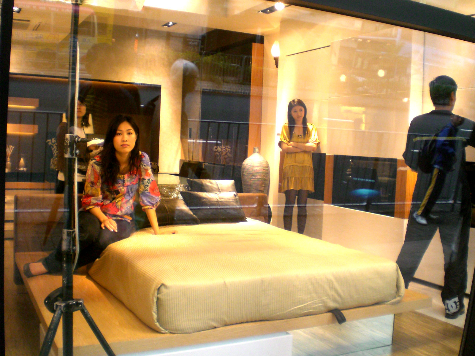 無綫電視節目《更上一層樓》藝員張雪芹和徐淑敏外影拍攝在灣仔駱克道一間家具店內